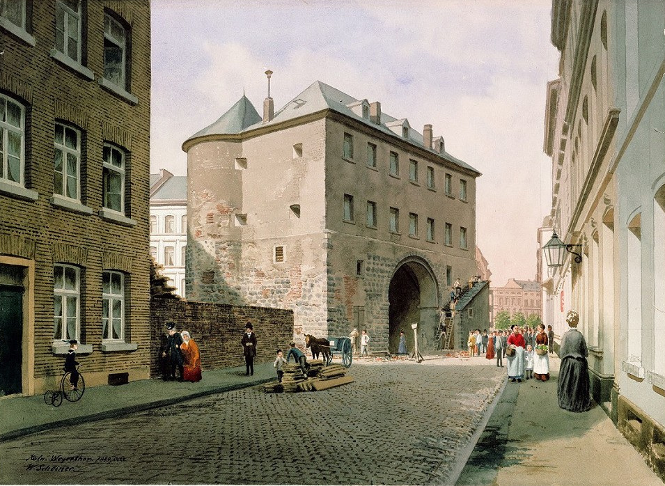 Wilhelm Scheiner: Köln, Weyertor , Stadtseite, Köln, 1889; bez. links unten: Köln. Weyerthor. 1889. Oct.2. / W. Scheiner. Aquarell, H: 37,5 cm, B: 51,5 cm, Inv.-Nr. KSM 1907/140. Ankauf eines Konvolutes von 65 grafischen Blättern und 34 Fotografien 1907 von Wilhelm Scheiner als Geschenk von »Herrn« [d. i. Franz] Clouth, Köln-Nippes. Foto: rba_c000426